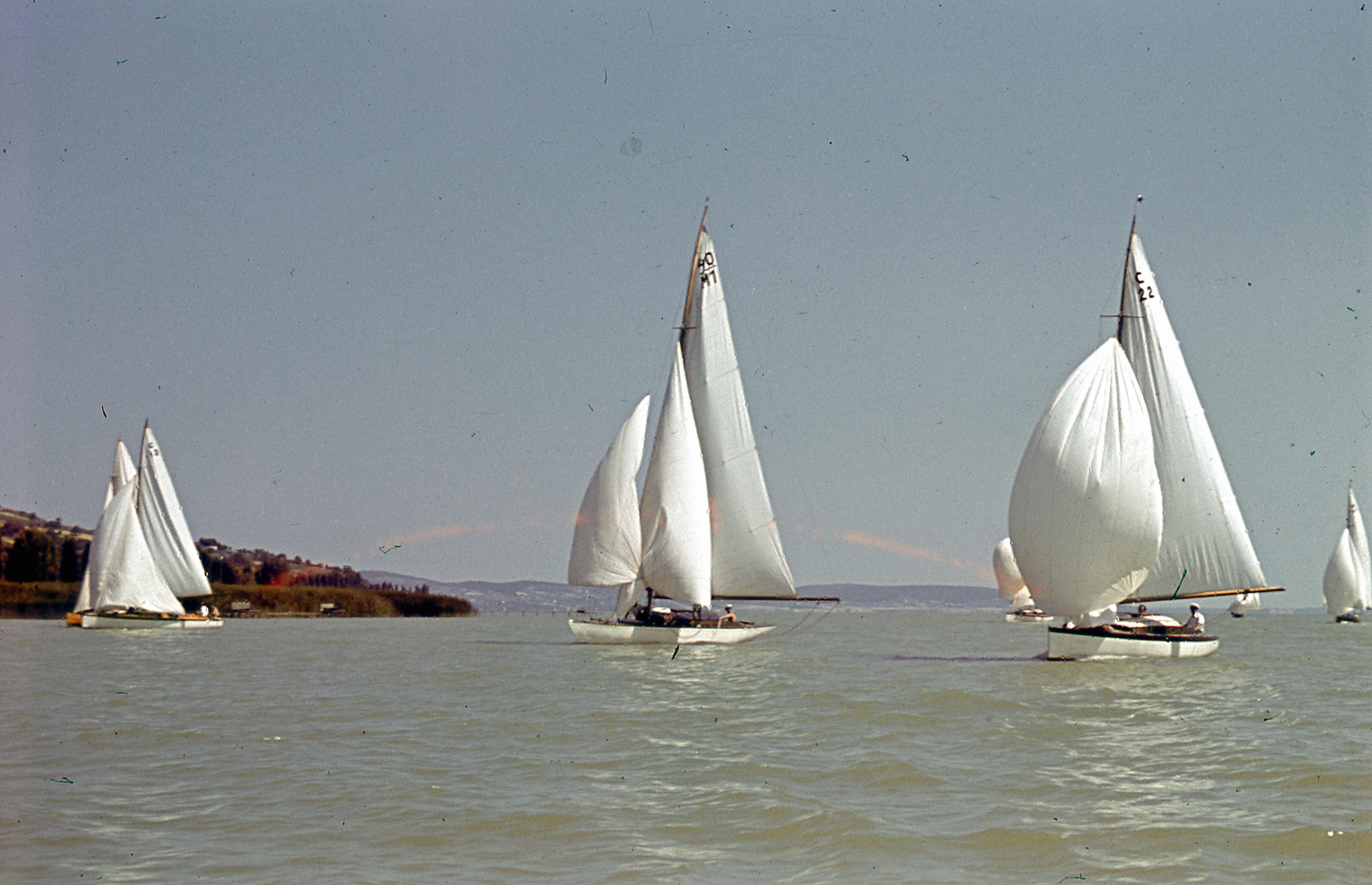 1942-es kékszalag Tihanynál. Location: Hungary, Lake Balaton Tags: colorful Title: 1942-es kékszalag Tihanynál.